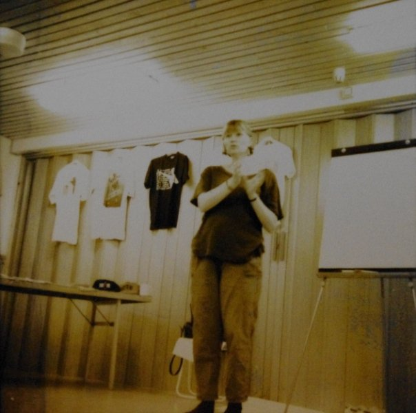 Anna-Lena Lodenius